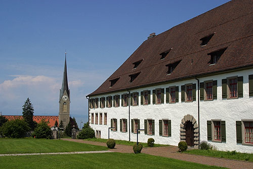 Ehemaliges Kloster Mariaberg (Pädag. Hochschule)